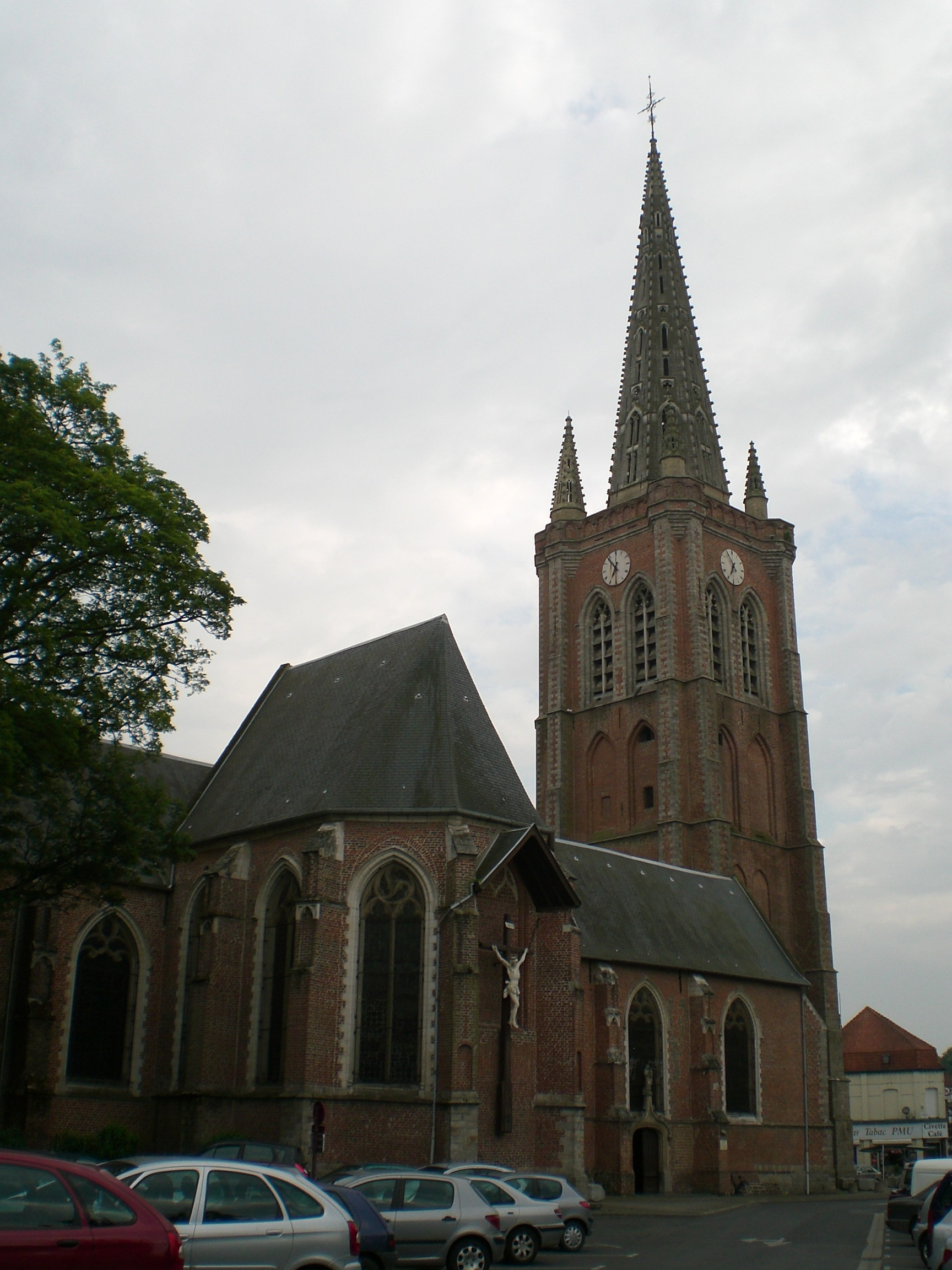 Église Saint-Eloi à Hazebrouck.